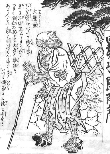 Ōzatō (大座頭) from the Konjaku Hyakki Shūi (今昔百鬼拾遺)